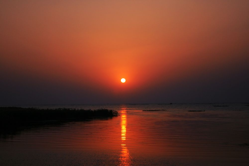 宿迁骆马湖落日